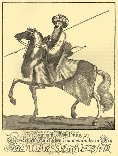 Abdi, az utolsó budai pasa. A kép alján: Zu finden bey Leonhardt Lofchger